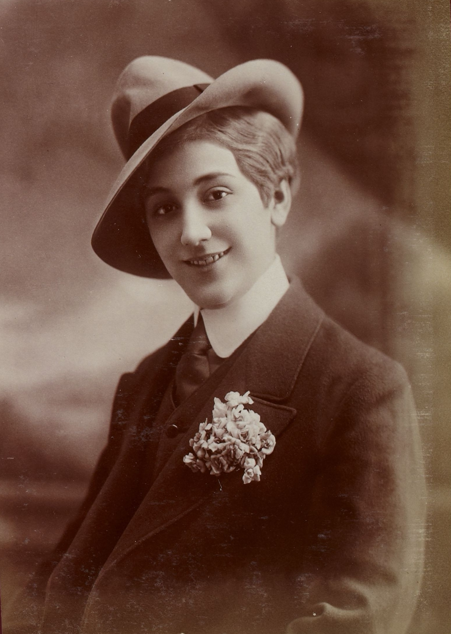 Album Reutlinger de portraits divers, vol. 45 : [photographie positive] : Aimée Campton.